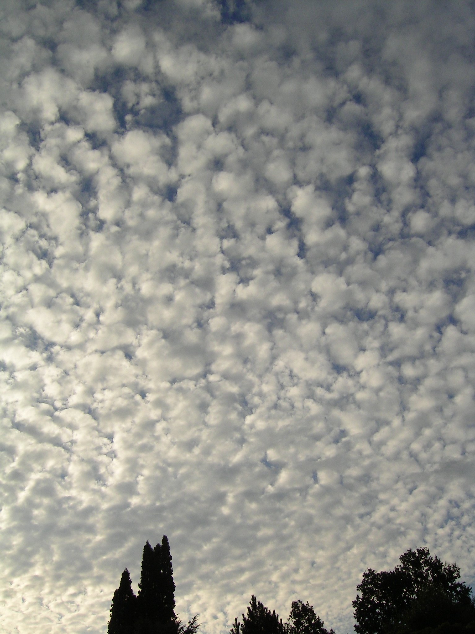 (en) Nice Altocumulus stratiformis (de) Schöner Altocumulus stratiformis am Morgen Aufnahmeort: Uzwil (SG), Schweiz Bearbeitung: war nicht nötig